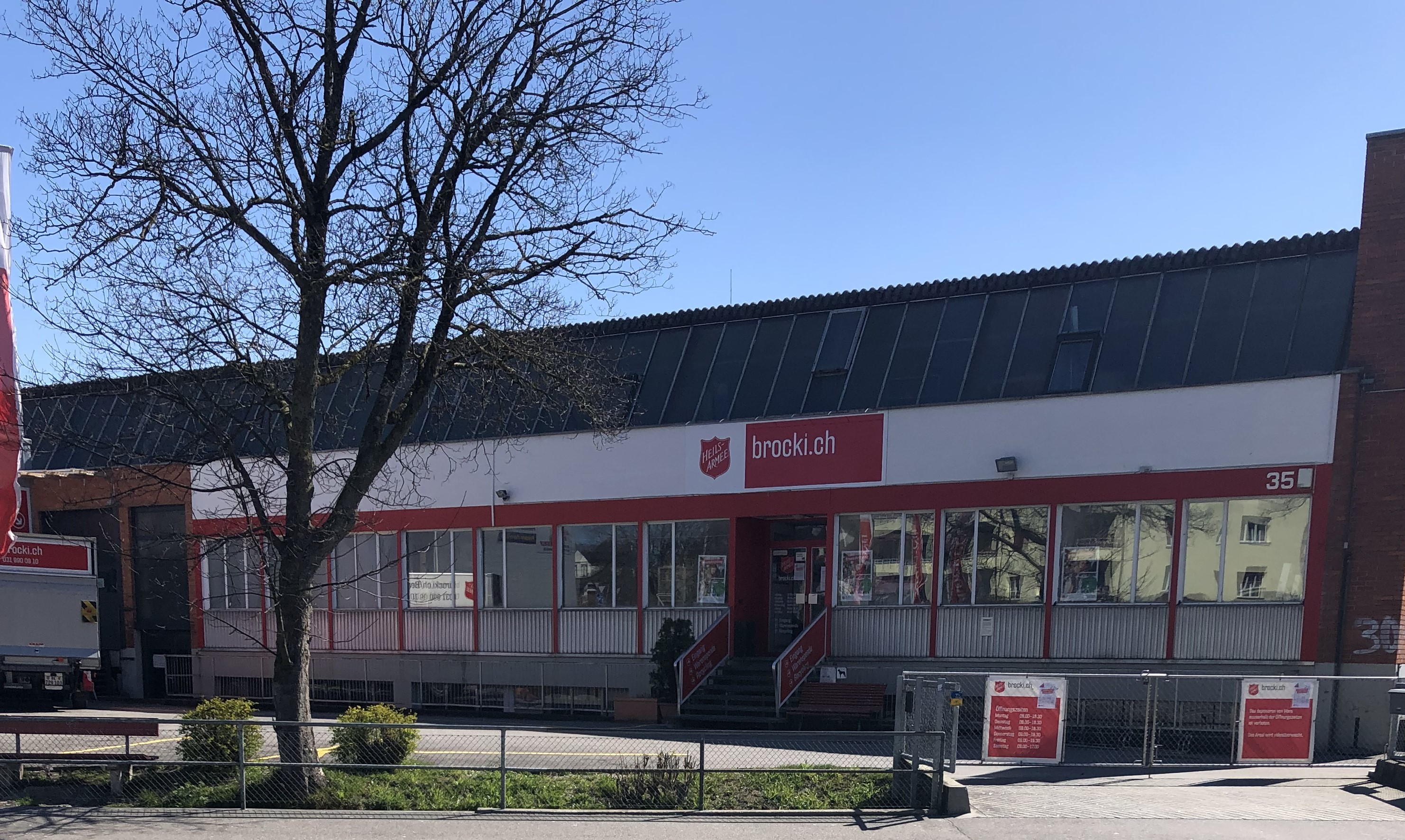 Blumenfeld Brocki der Heilsarmee